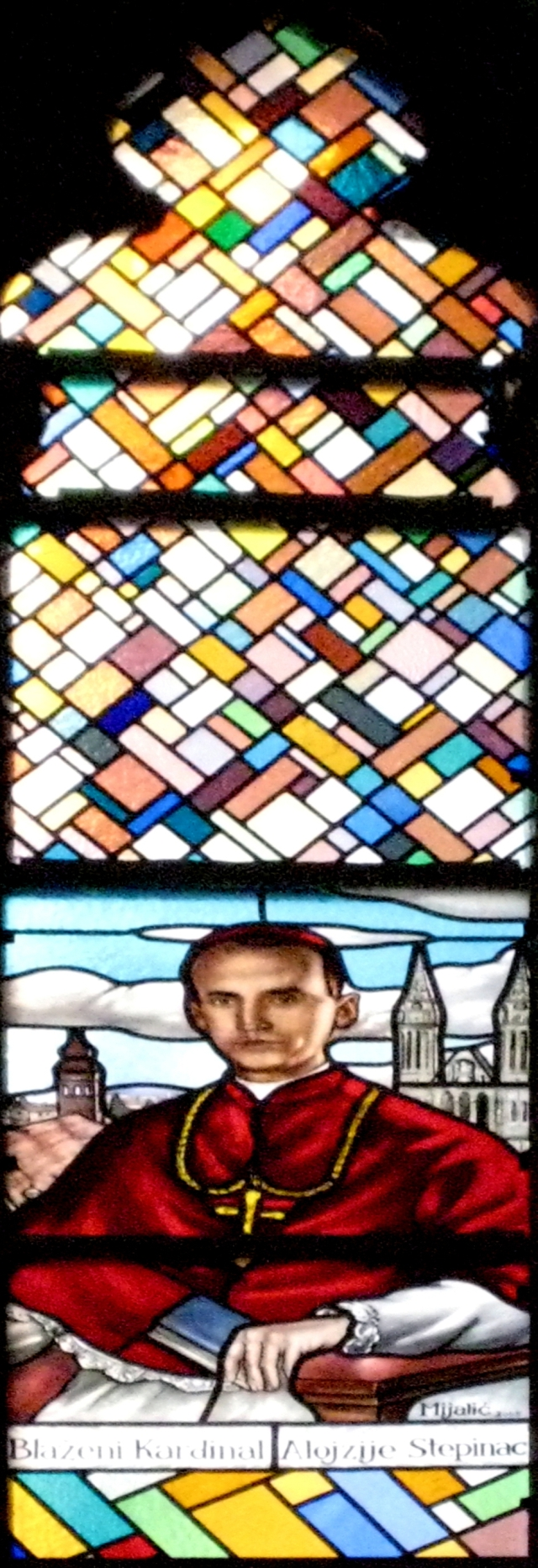 vitraj blaženog Alojzija Stepinca u crkvi Gospe Lurdske, Rijeka